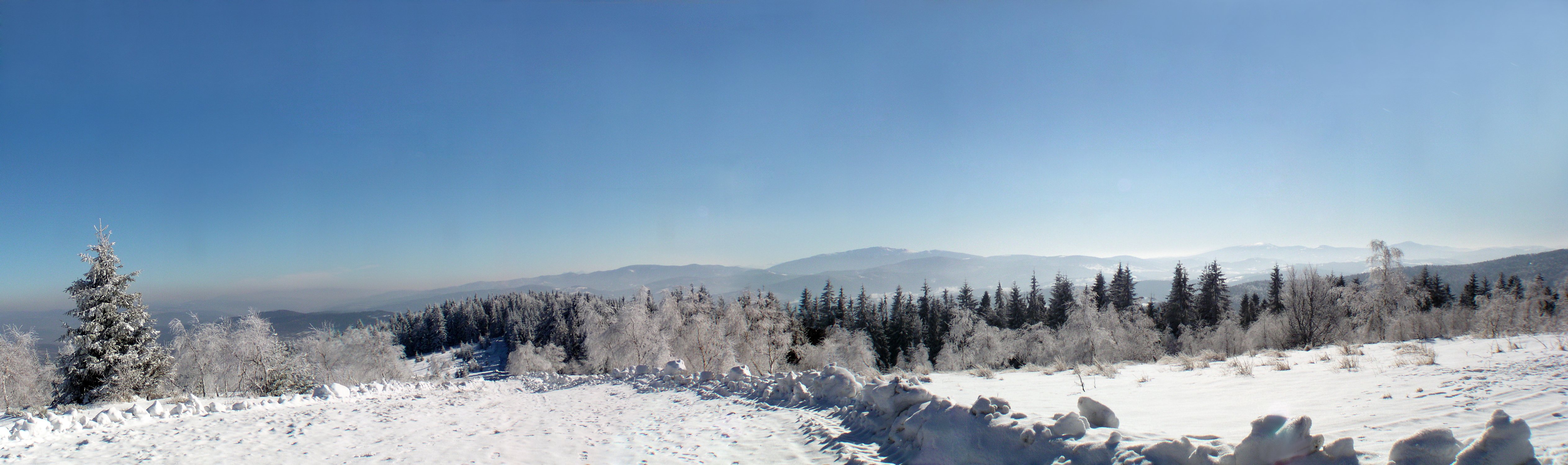 Widok ze szczytu Leskowca w Beskidzie Malym w kierunku Babiej Góry